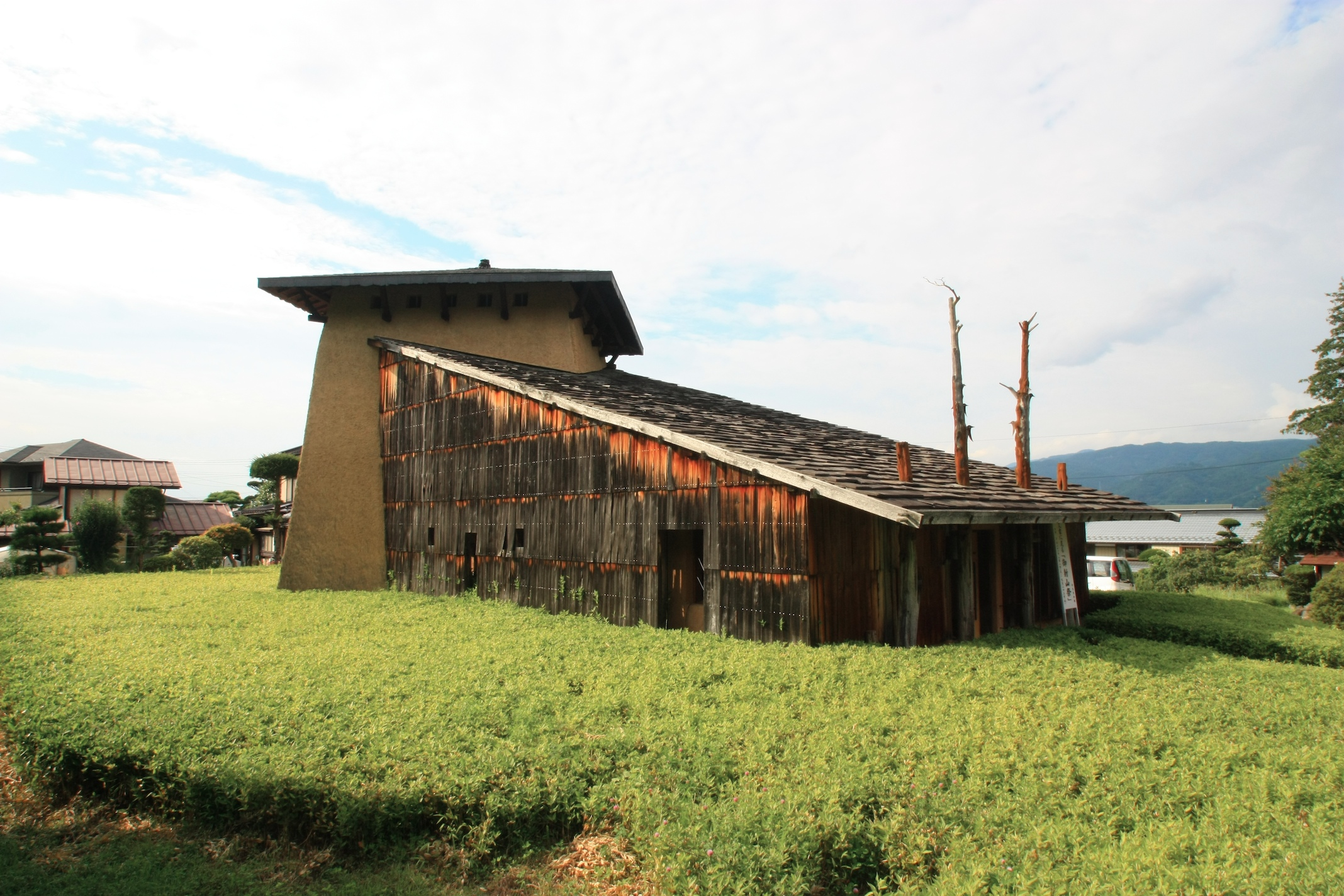 藤森照信設計の神長官守矢史料館。